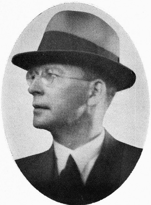 Erik Holmdal